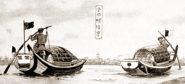 historische Abbildung zweier chinesischer Sampans (Shanghai)